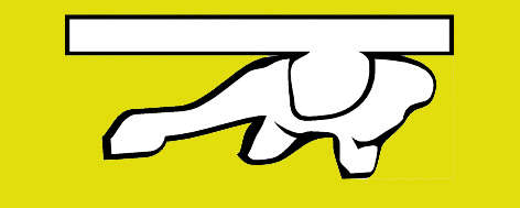 Goi-erliebea erliebe mota bat da. Mota honetan koskorraren erdia baino gehiago fondotik ateratzen da.